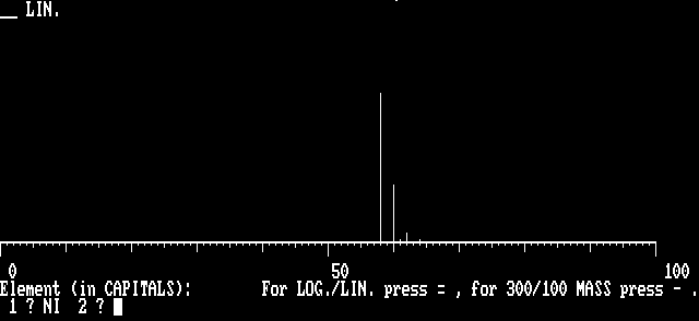 SIMS-Spektrum fon Nikkel